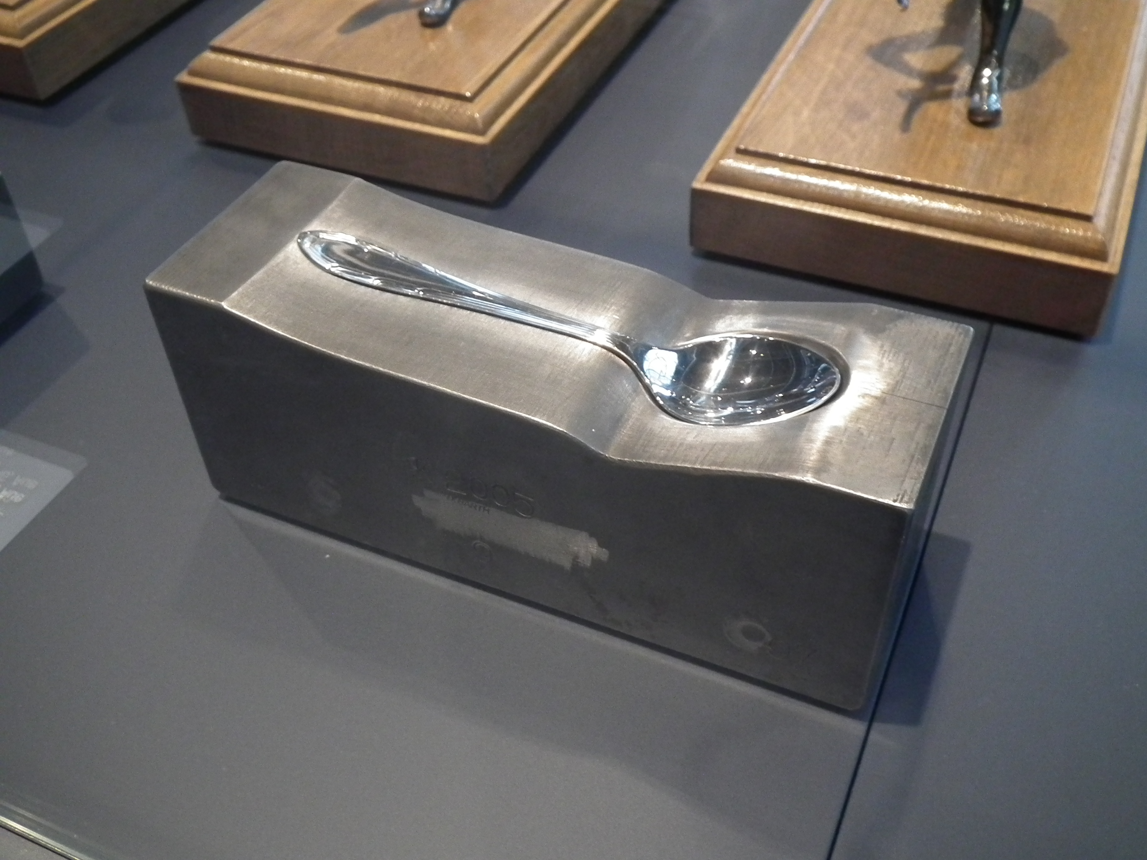 Industriemuseum Chemnitz